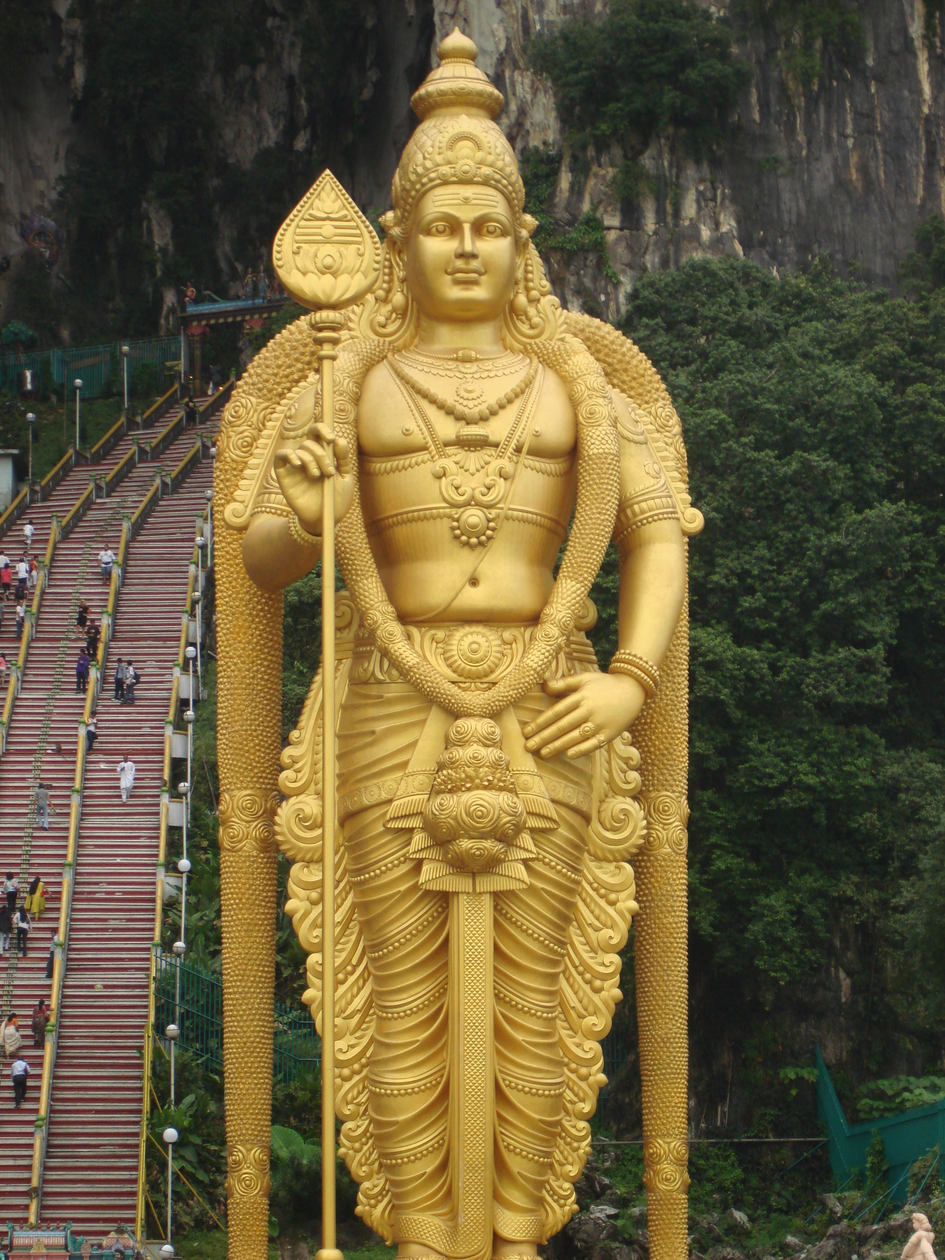 Lord Subrahmanya idol, Malaysia